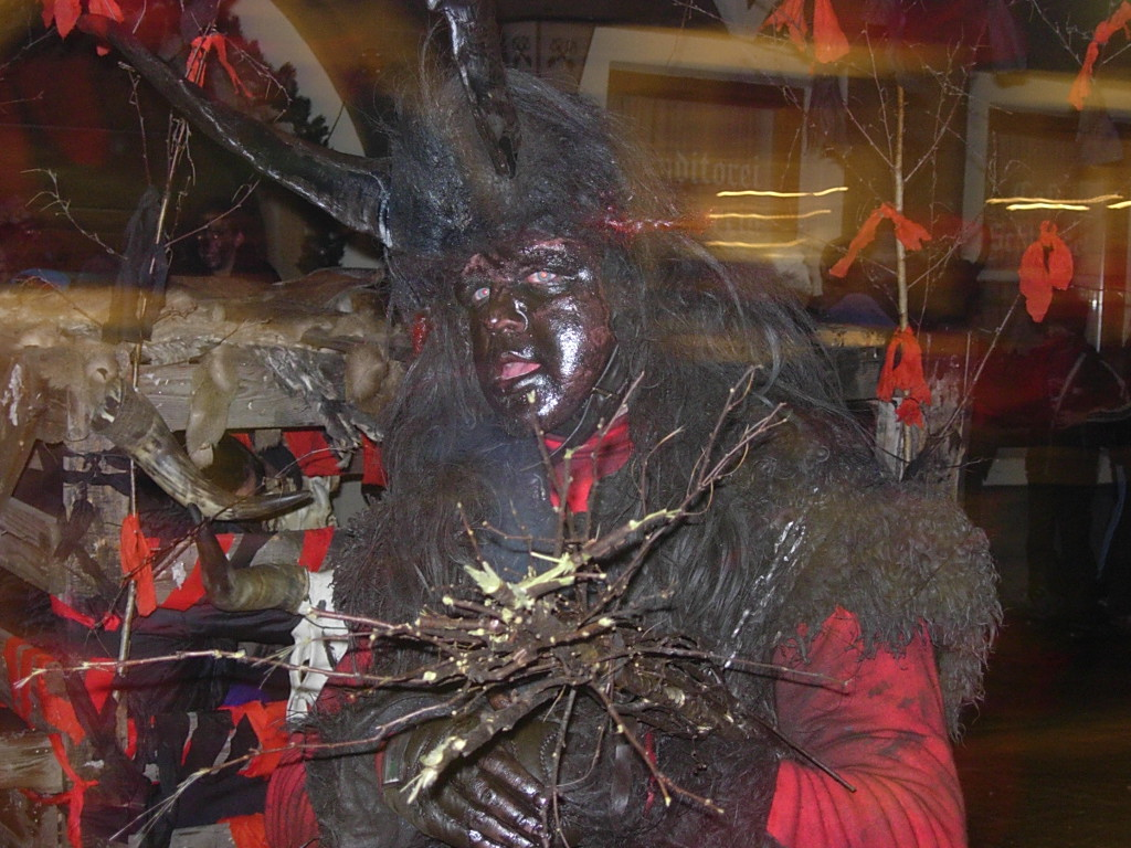 Krampusfete - La festa dei Krampus, 5 DICEMBRE